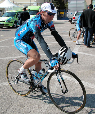 Afbeelding van Sergio Paulinho.